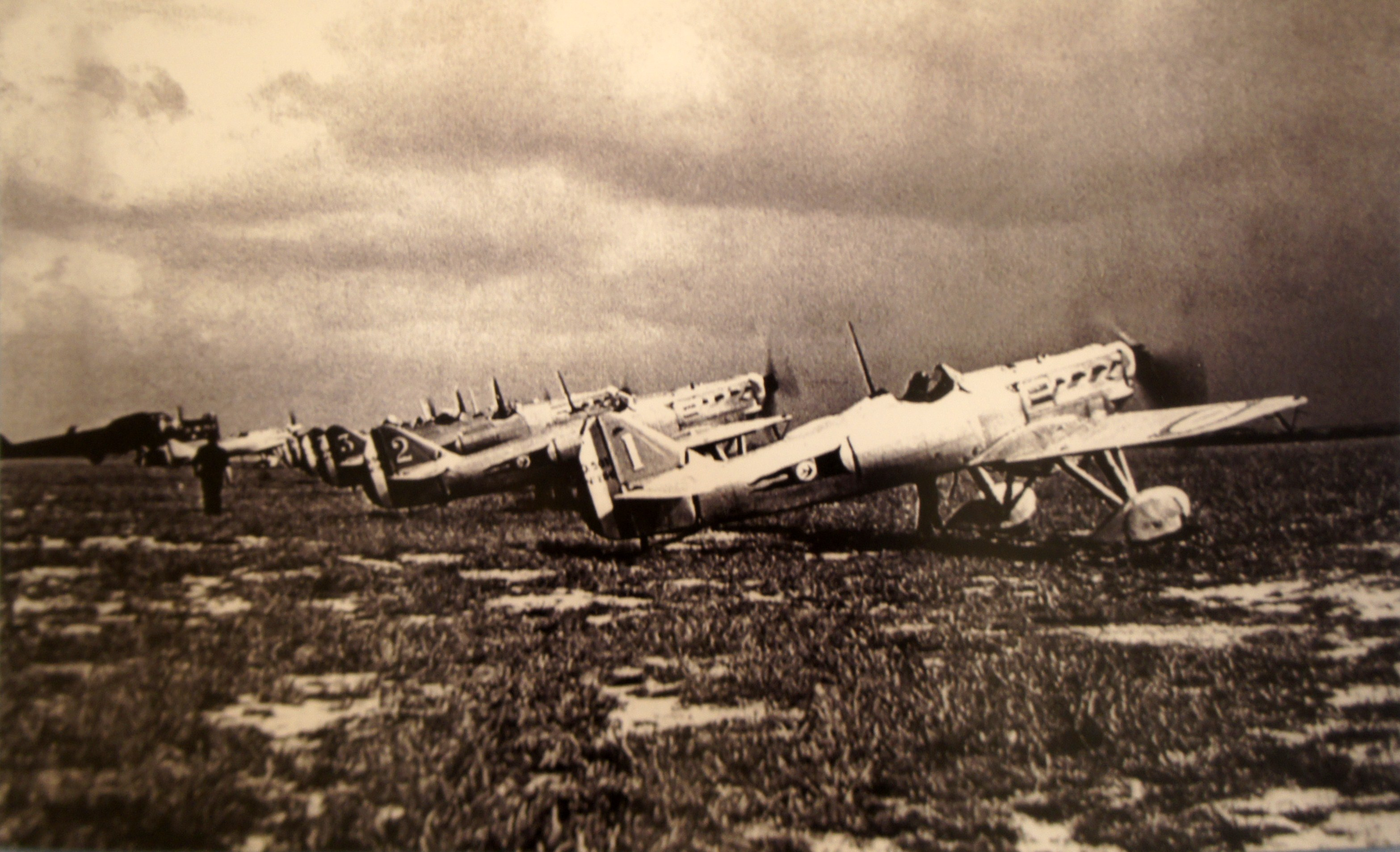 Des Dewoitine_de la SPA 95 sur la BA_112 .